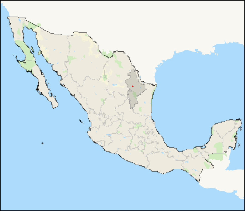 Mapa del distrito electoral federal 2 de Nuevo León ubicado en México